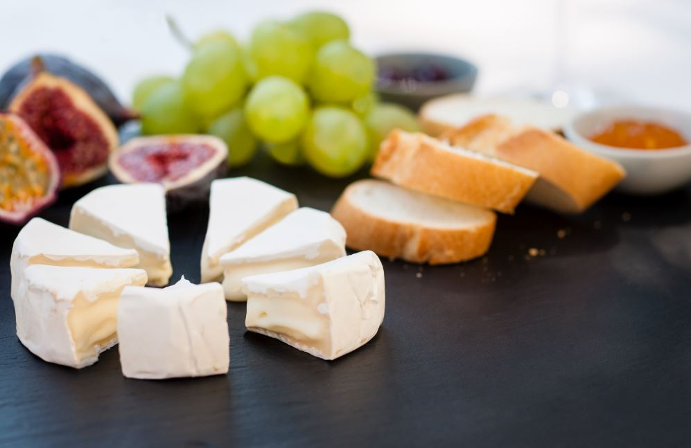 Sýr hermelín